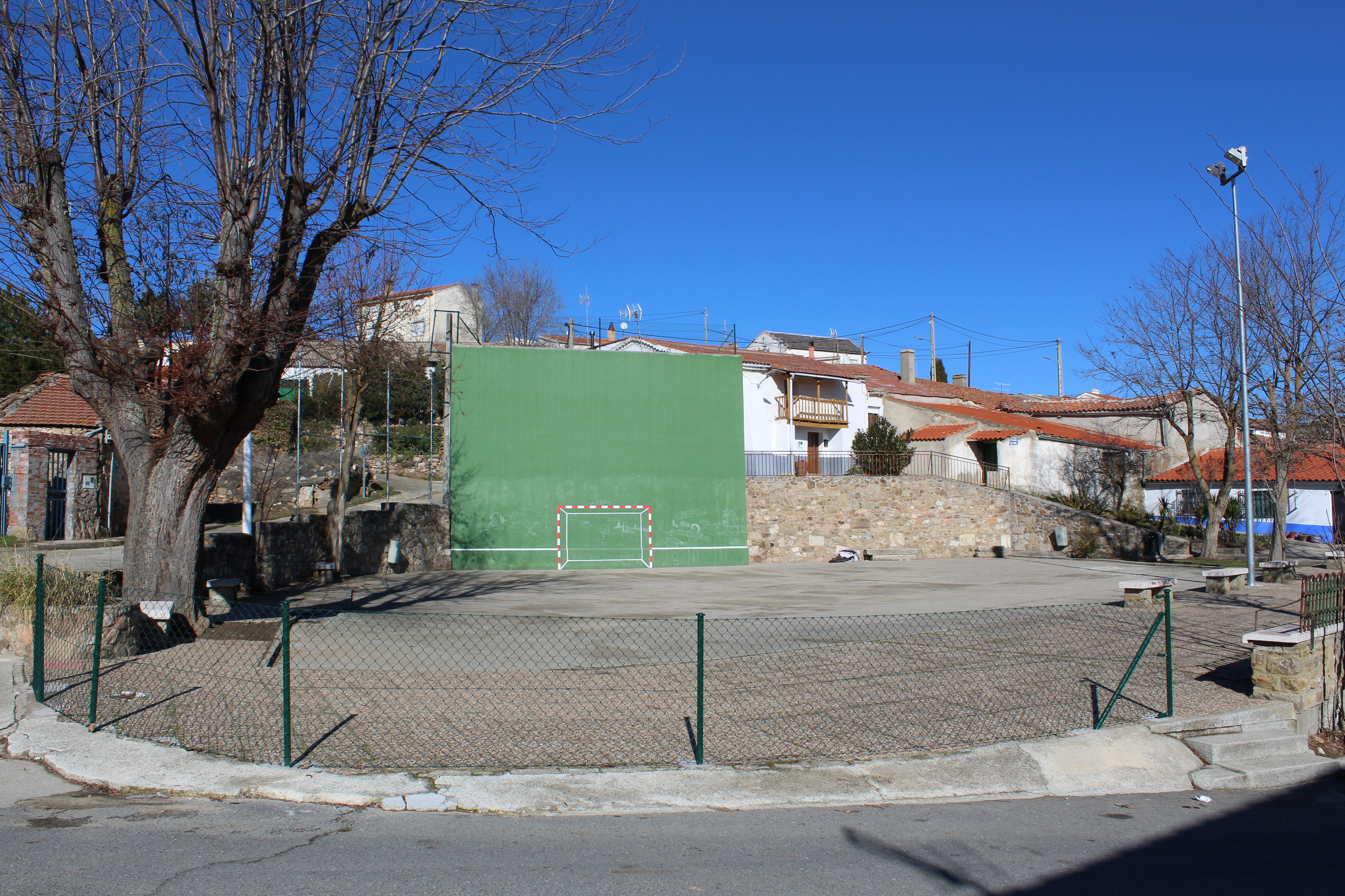 Plaza Ángel en Beleña, es una plaza circular que tiene un frontón con una portería dibujada, un viejo olmo y varios bancos de granito.